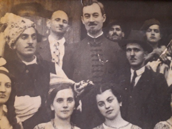 Echipa artistica a Caminului Cultural Regele Carol II Pietroșița, circa 1932; in rândul Ide sus centru Preotul Gh Gh Simionescu